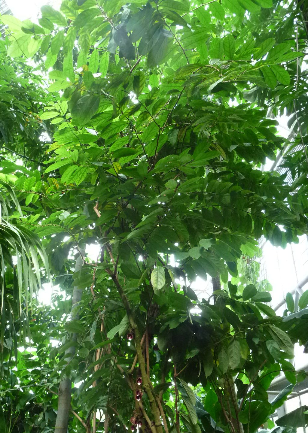 Aristolochia arborea (Hamburgi pálmaház)